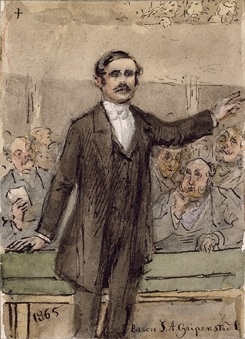 Johan August Gripenstedt (1813-1874). Akvarell och blyerts på papper. Mått 12,2 x 8,8 cm